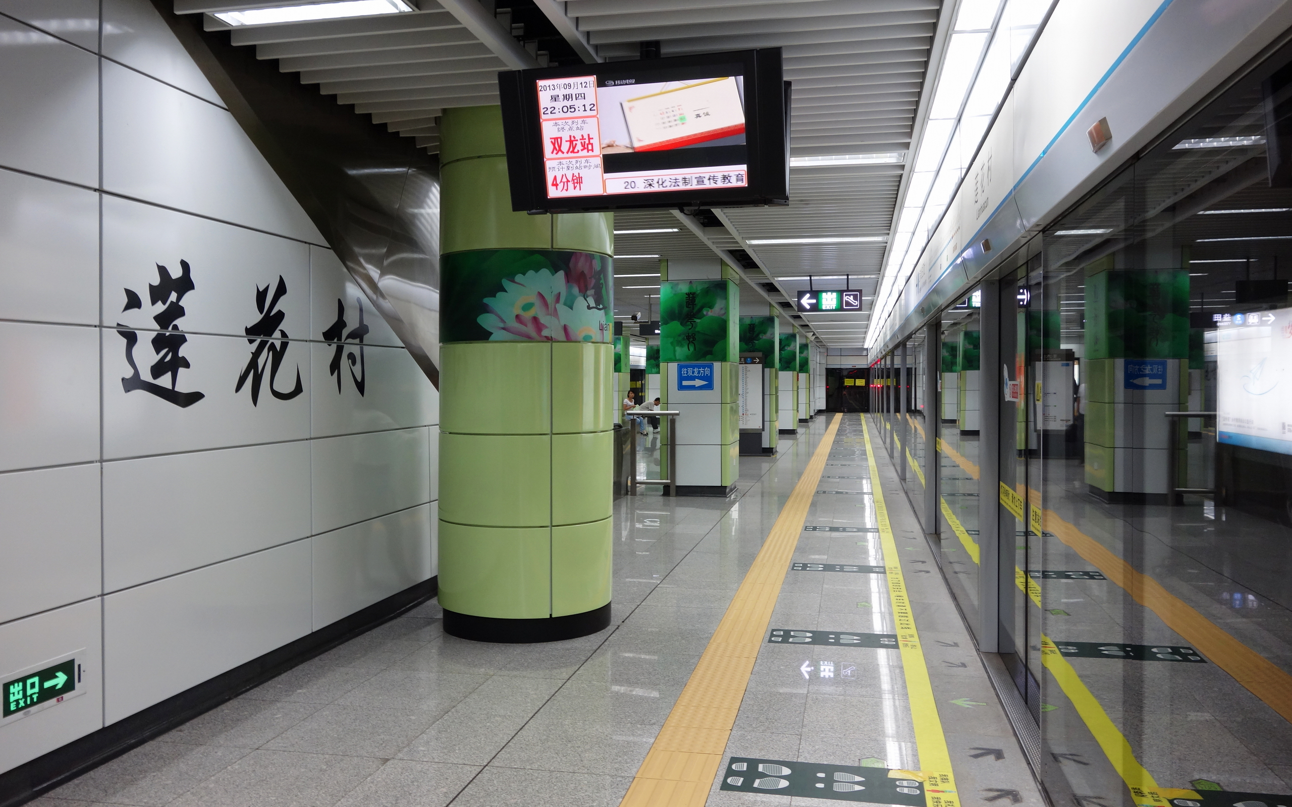 龙岗线莲花村车站的站台层.